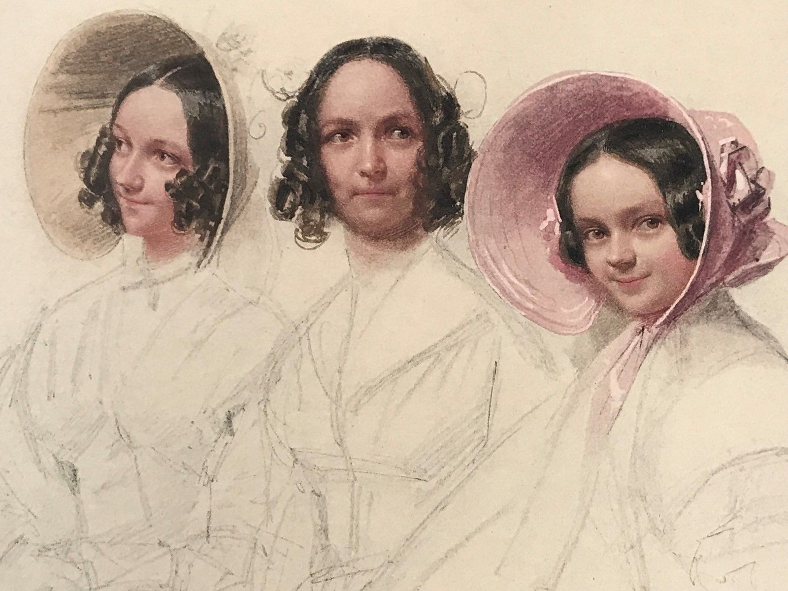 Farblithografie Auguste Crelinger-Stich, Töchter Bertha u. Clara Franz Krüger Berlin ~1820, Porträts der Auguste Crelinger-Stich mit ihreren Töchtern Bertha und Clara, Faksimiledruck nach einem Aquarell von Franz Krüger Berlin um 1820, das sich in der Nationalgalerie zu Berlin befindet. Links unten bezeichnet "Bertha Stich" und rechts unten "Clara Stich". Darstellung auf leichtem Karton 23,5 x 30,7 cm